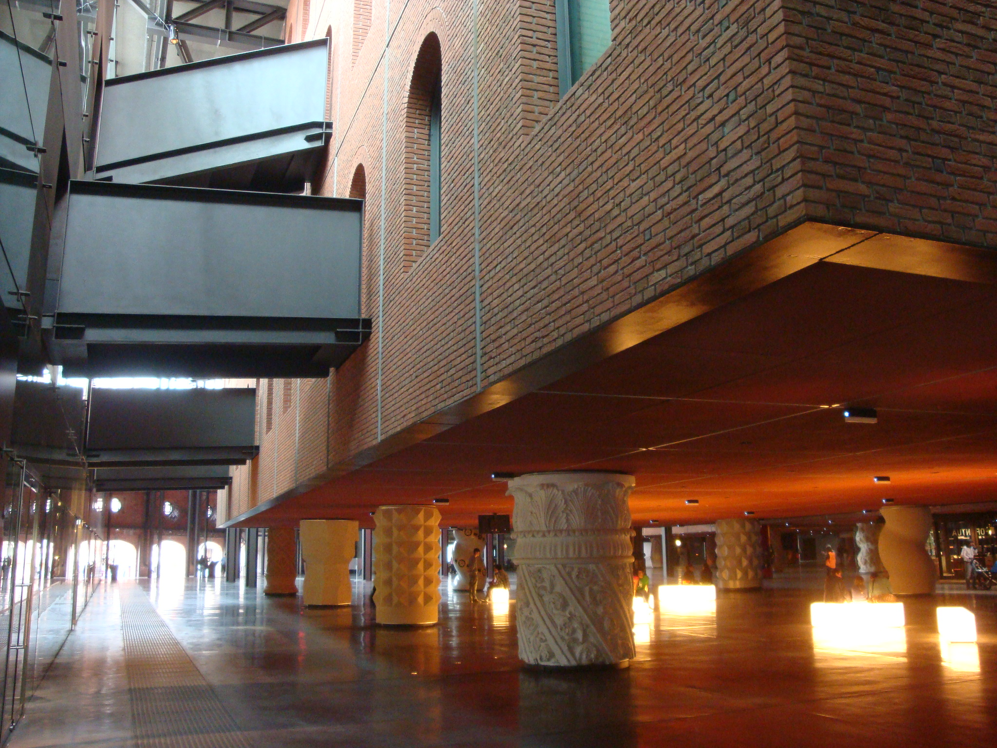 Centre culturel et de loisirs Alhondiga, Bilbao, P. Starck